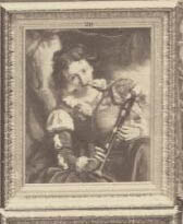 Heureux âge